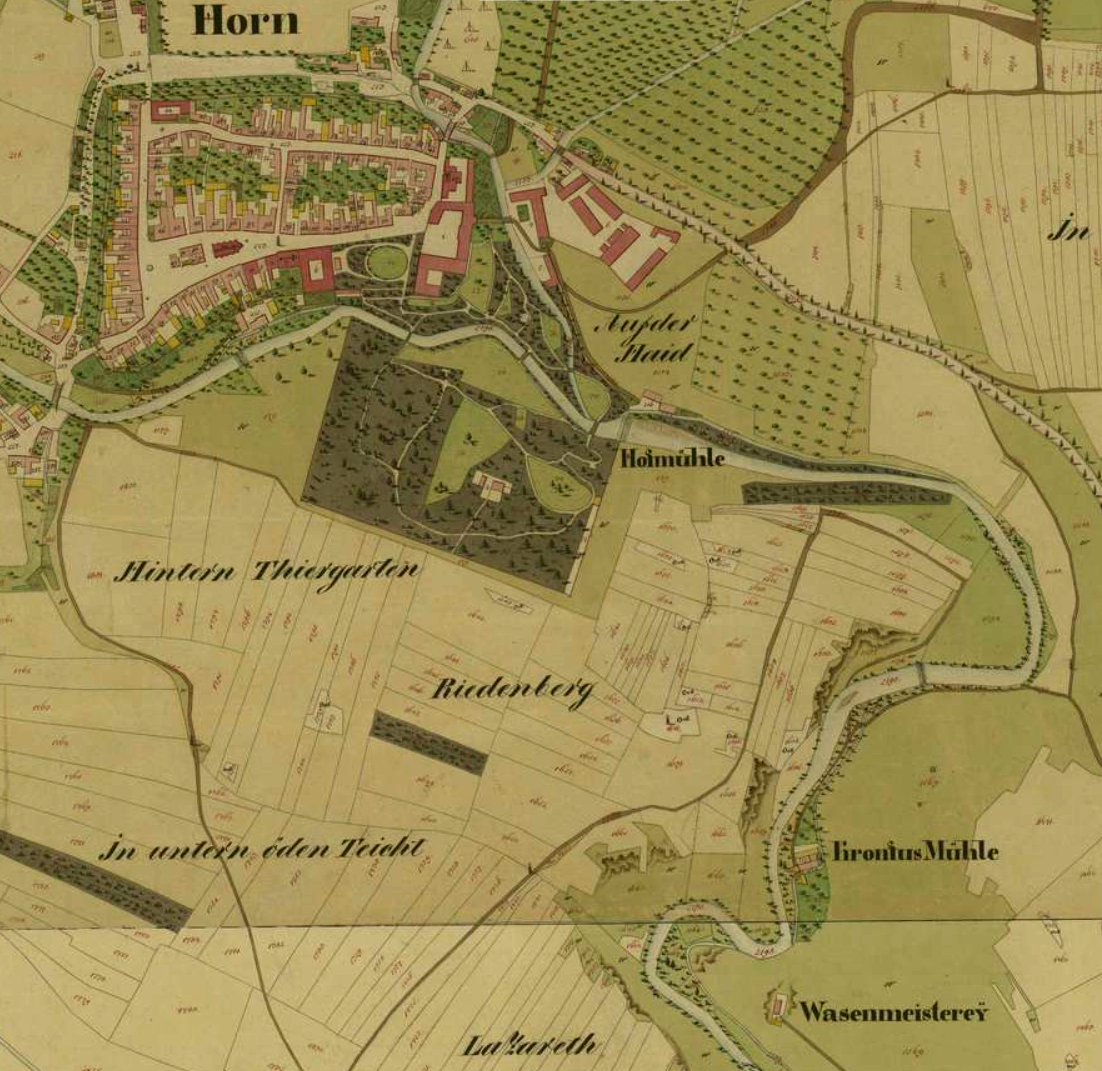 Ausschnitt aus dem Franziszeischen Kataster: Horn mit Riedenburg und der Taffa-Schleife.